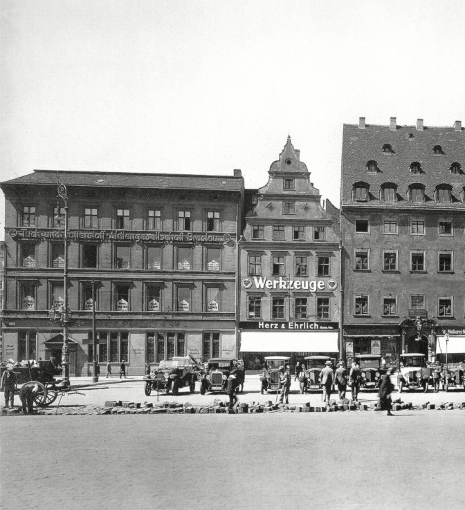 Zachodnia pierzeja Rynku. Kamienice nr 9 i 10/11 przed ich wyburzeniem pod budowę gmachu Miejskiej Kasy Oszczędności